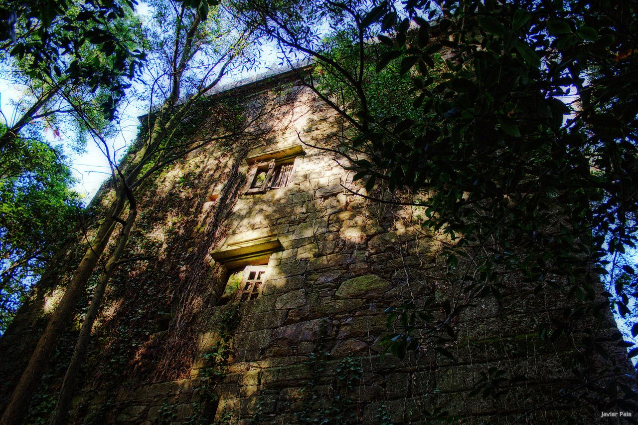 Torre da Penela. El antiguo castillo de La Penela estaba formado por dos torres, de las que actualmente sólo se conserva una. Su fundador fue Lope Bermúdez, descendiente de los Bermúdez de Traba. Posteriormente pasó a menos de los Condes de Priegue, dueños de las Torres de Celas de Peiro. En el siglo XVII fue convertido en pazo. Se trata de una torre de dos plantas y sótano en el que se abre una puerta con arco de medio punto con grandes dovelas. En la fachada hay un escudo con las armas de los Castro, Rioboo y Bermúdez. Algunas de las ventanas son de factura más moderna y en la parte alta hay una terraza almenada.